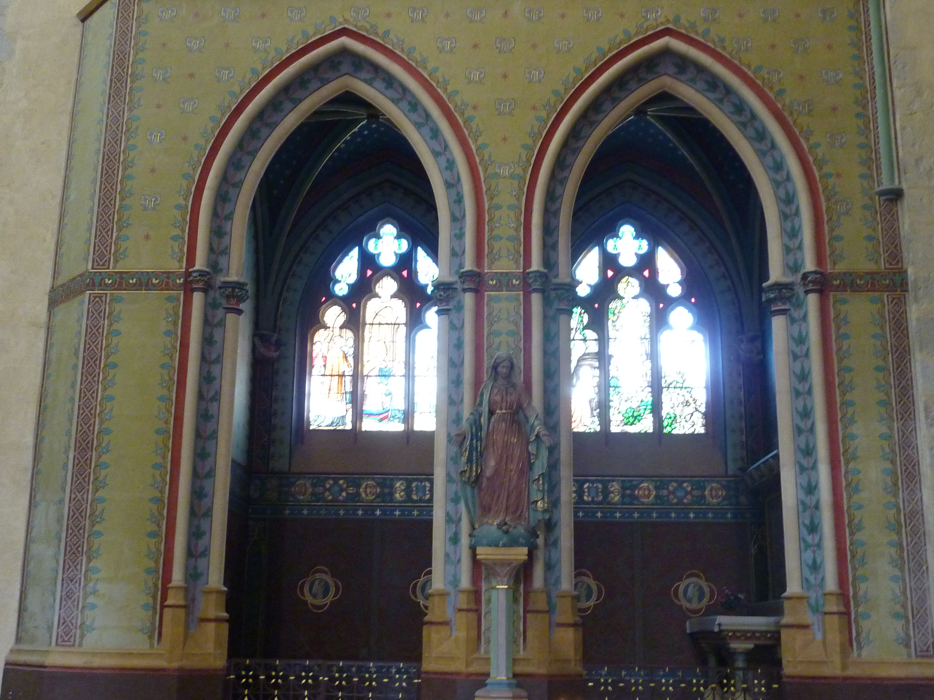 Nevers : cathédrale Saint-Cyr-et-Sainte-Julitte , chapelle de l'Immaculée Conception (XVe)